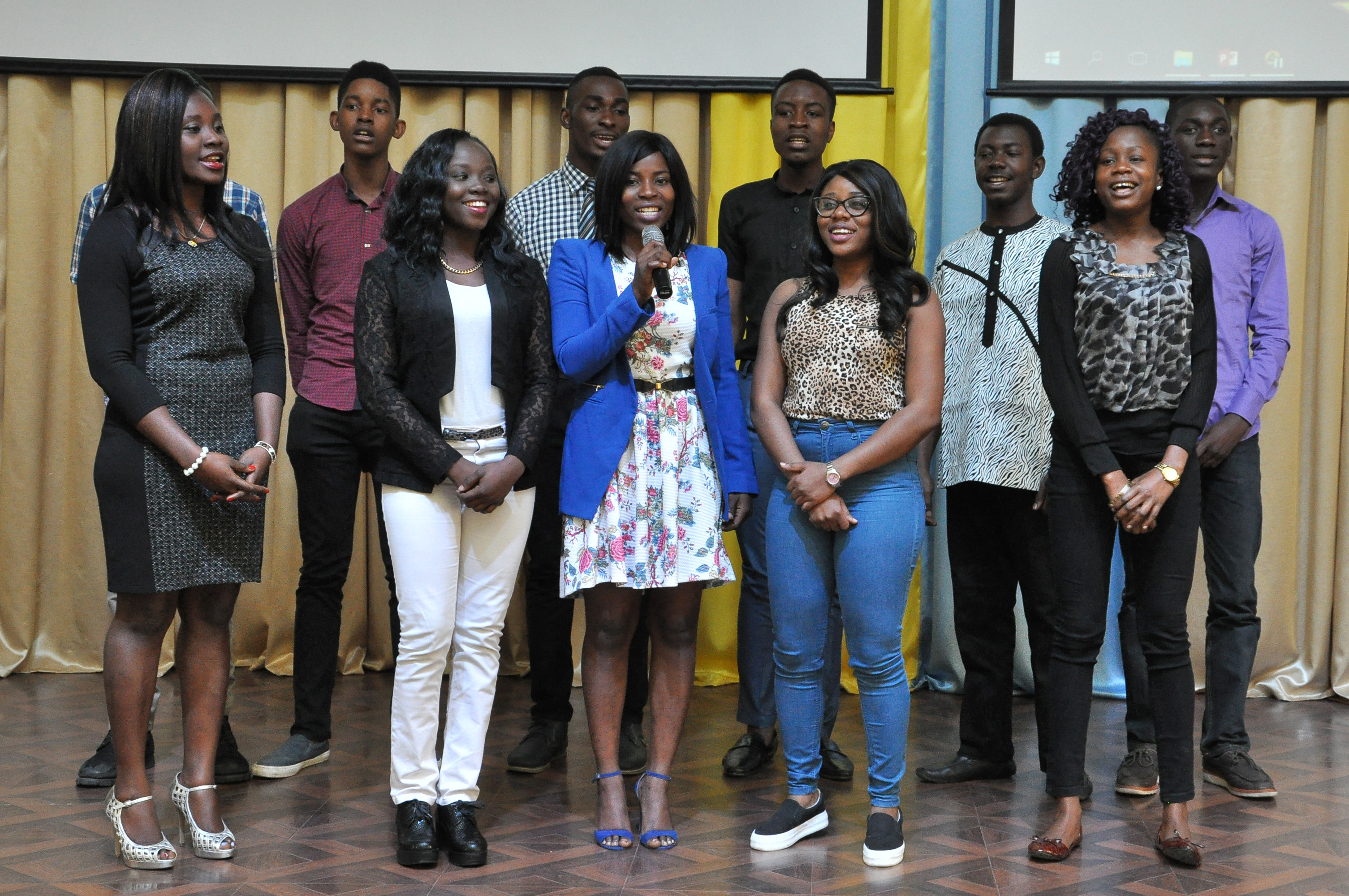 Літературно-музичне свято «Мова єднає нас», зорганізоване слухачами підготовчого відділення факультету іноземних студентів ТДМУ.